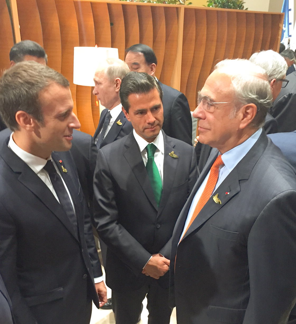 Cumbre de Líderes del G20